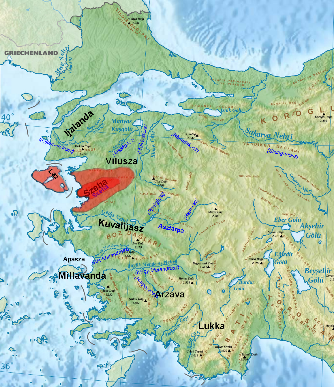 Nyugat-Anatólia i. e. 14. századi térképe